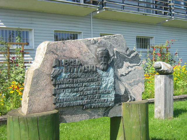 Tablica poświęcona Alfredowi Lityńskiemu